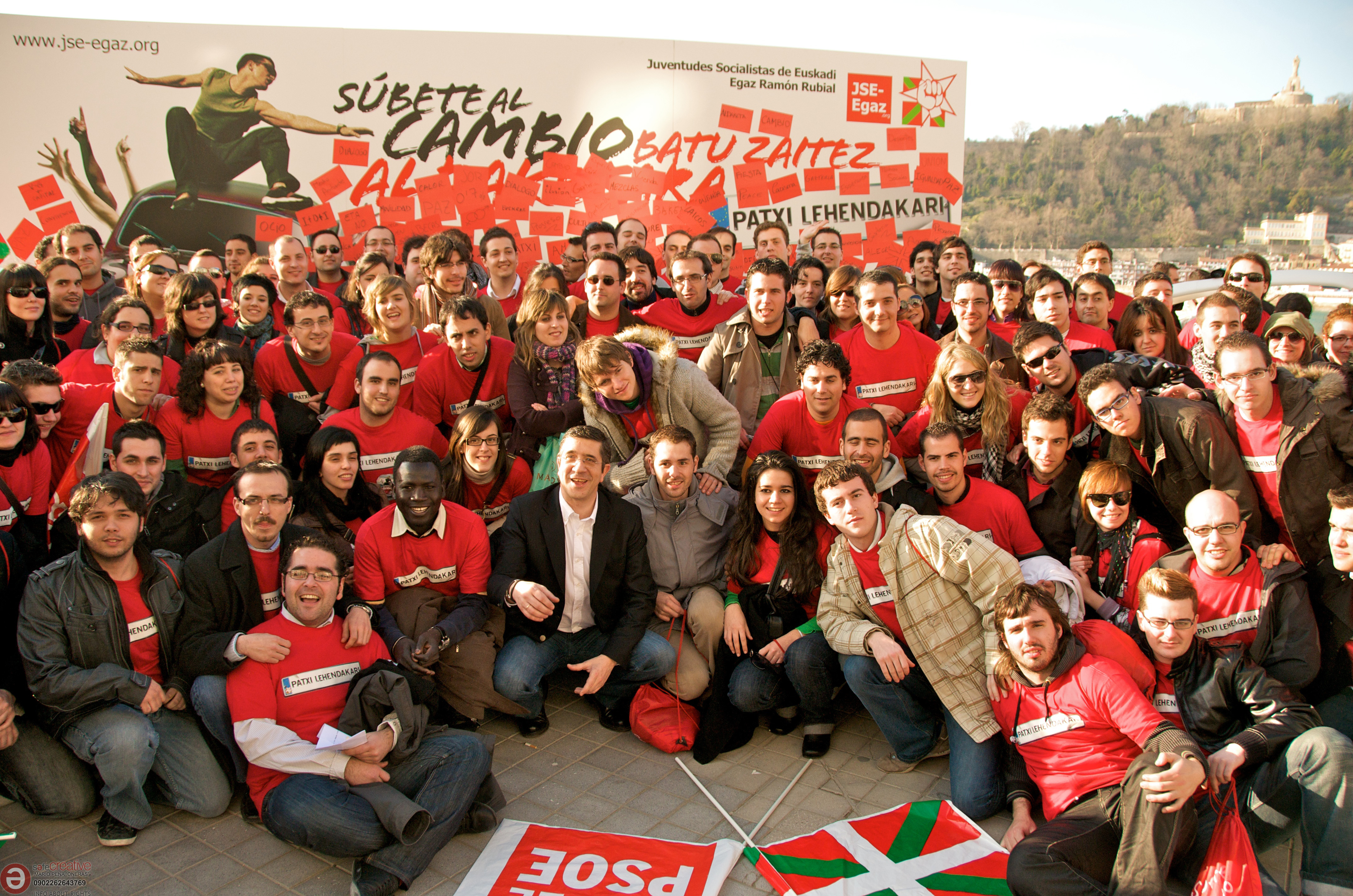 Patxi Lopez en el paseo de La Concha de San Sebastián junto a miembros de las Juventudes Socialistas de Euskadi durante el día de carnaval, en plena campaña para las autonómicas vascas de 2009 Patxi López, candidato a lehendakari junto a miembros de las juventudes de su partido en el paseo de La Concha el día de carnaval. Información sobre autor y licencia de esta fotografía aquí